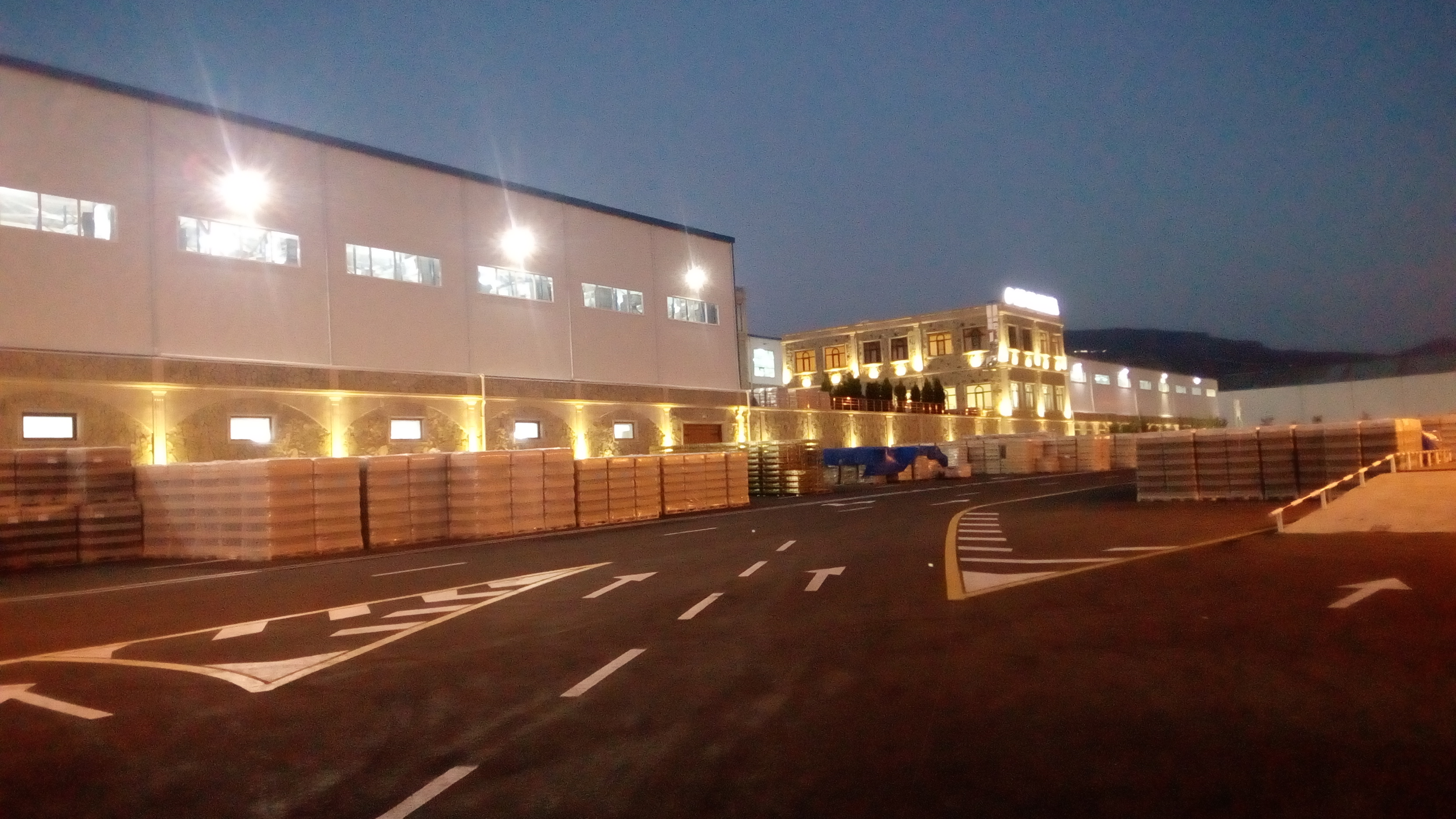 MİRAS-la Az-Granataya səfər